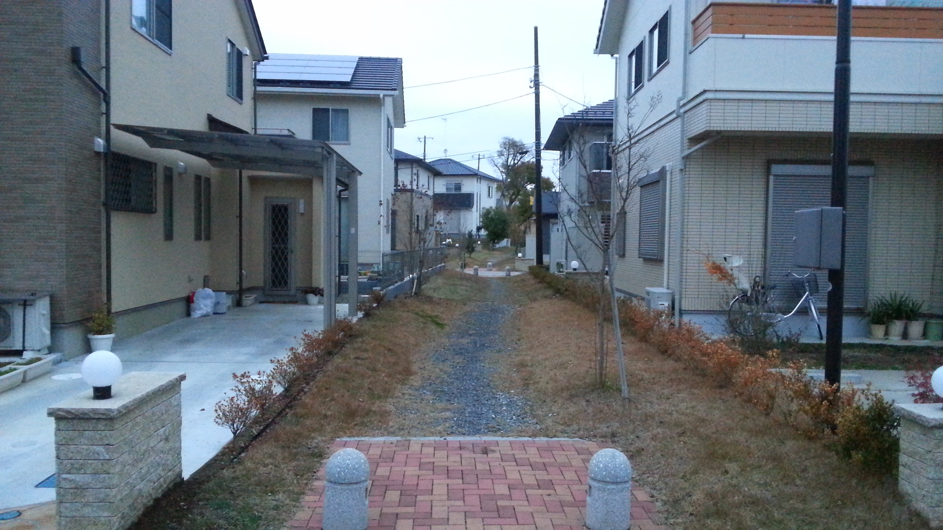 土浦市中 2